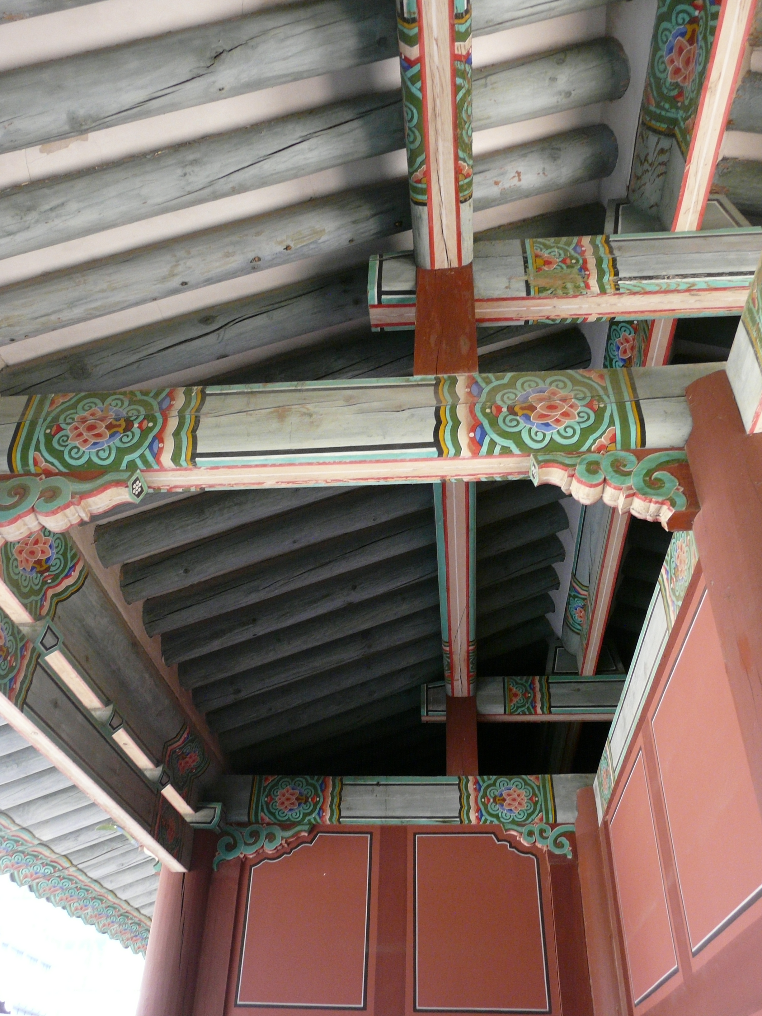 Changgyeonggung. Around Hyehwa station, Jongno-gu, Seoul